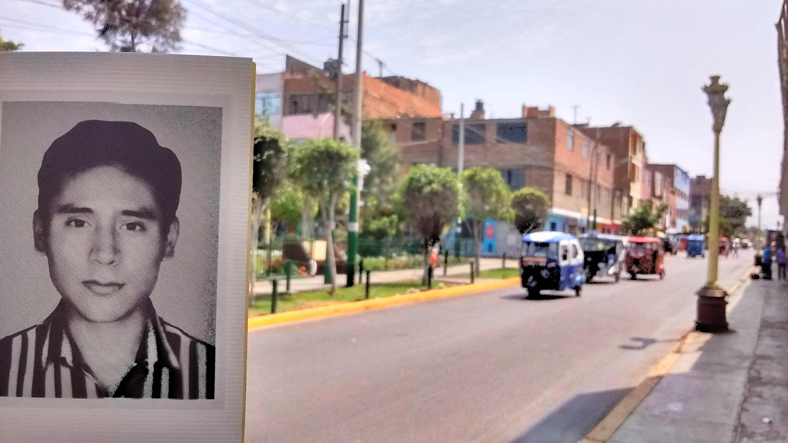 Martín Javier Roca Casas, desaparecido en 1993 , vecino de Carmen de la LEgua Reynoso, Callao.